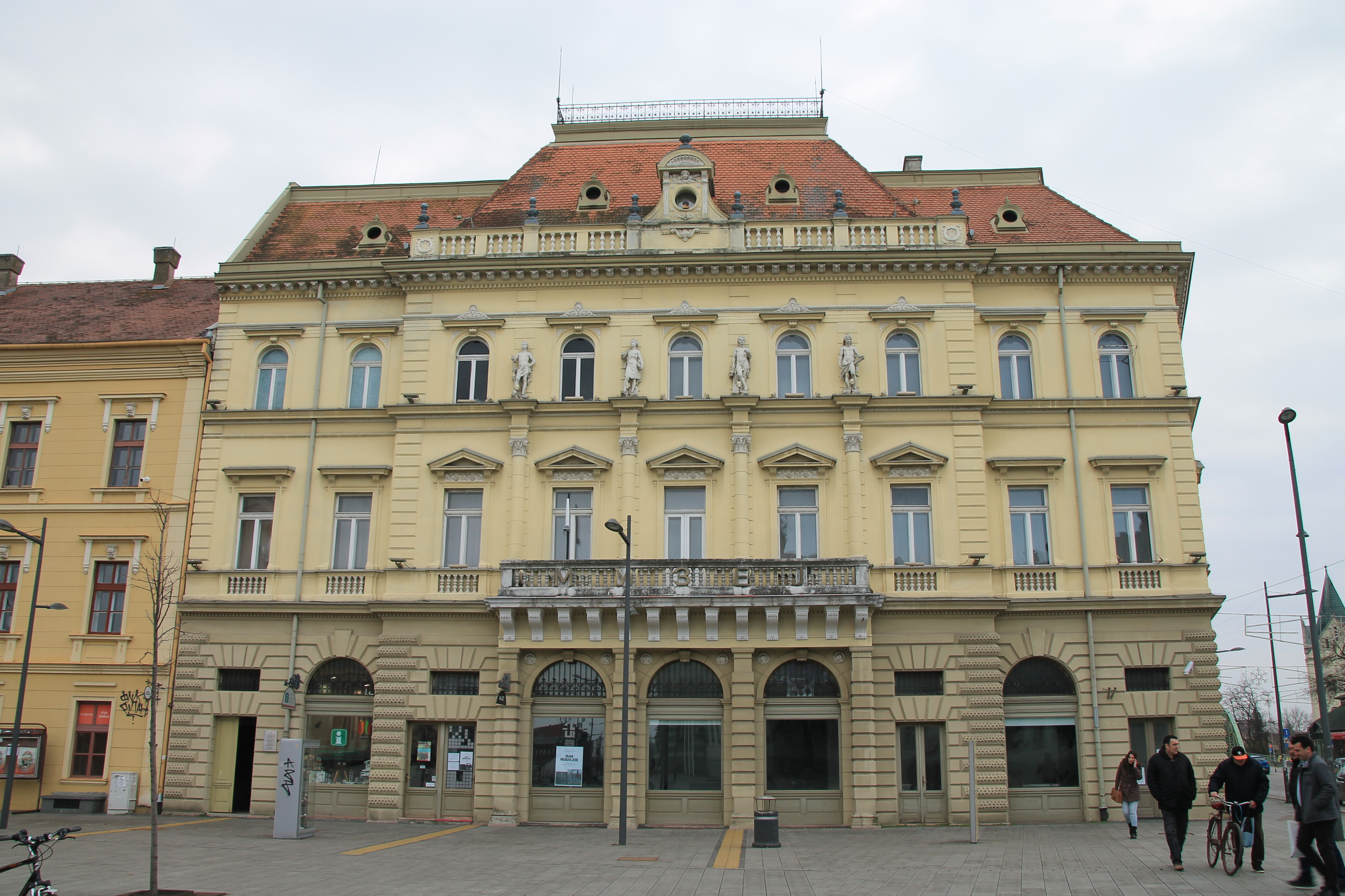 Staro jezgro Zrenjanina